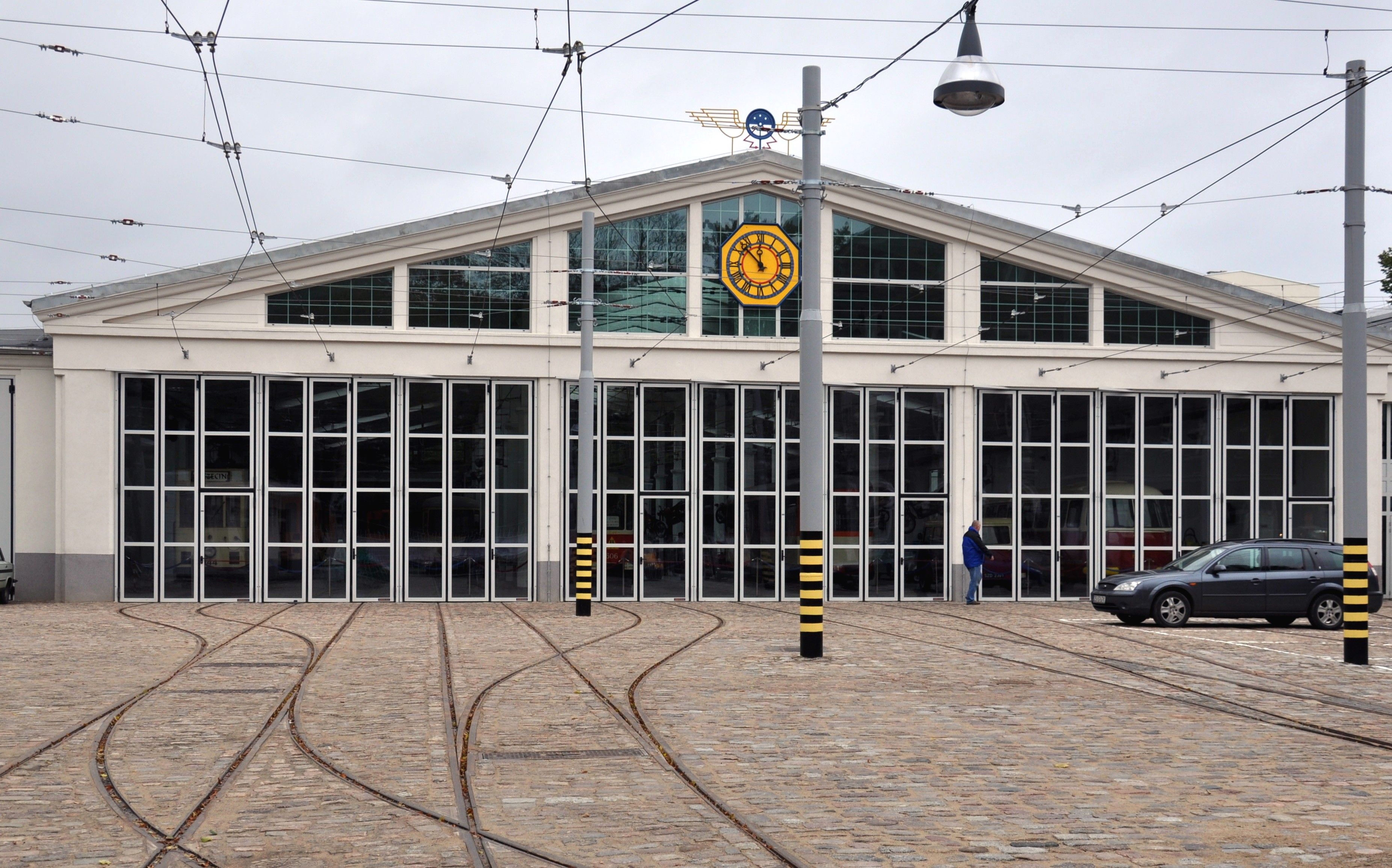 Muzeum Techniki i Komunikacji - Zajezdnia Sztuki w Szczecinie